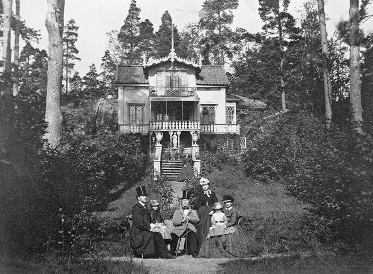 Depicted place: Stockholm, Villa Bergslottet, Lilla Essingen (Sverige (SE))